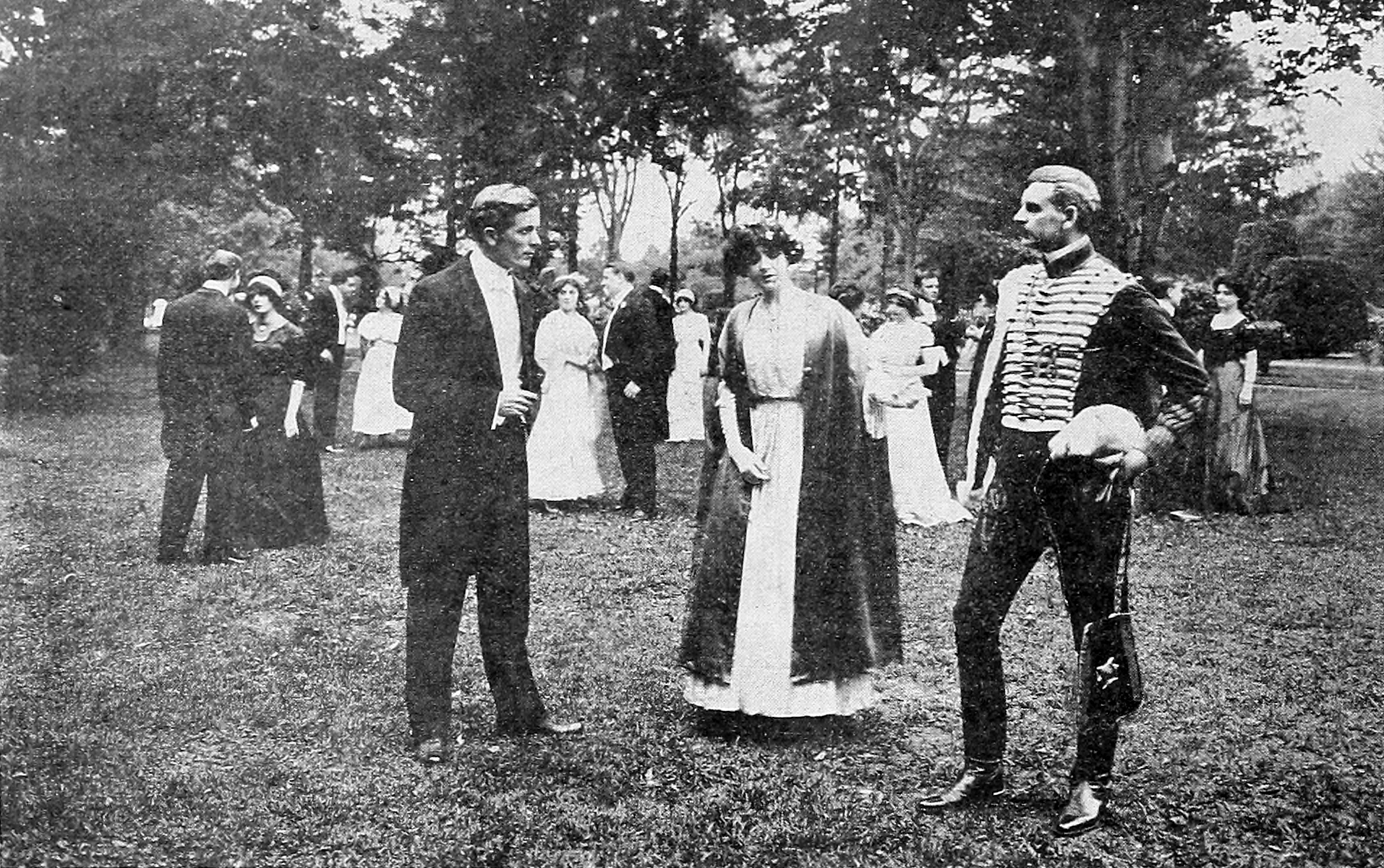 The Heart of Edna Leslie